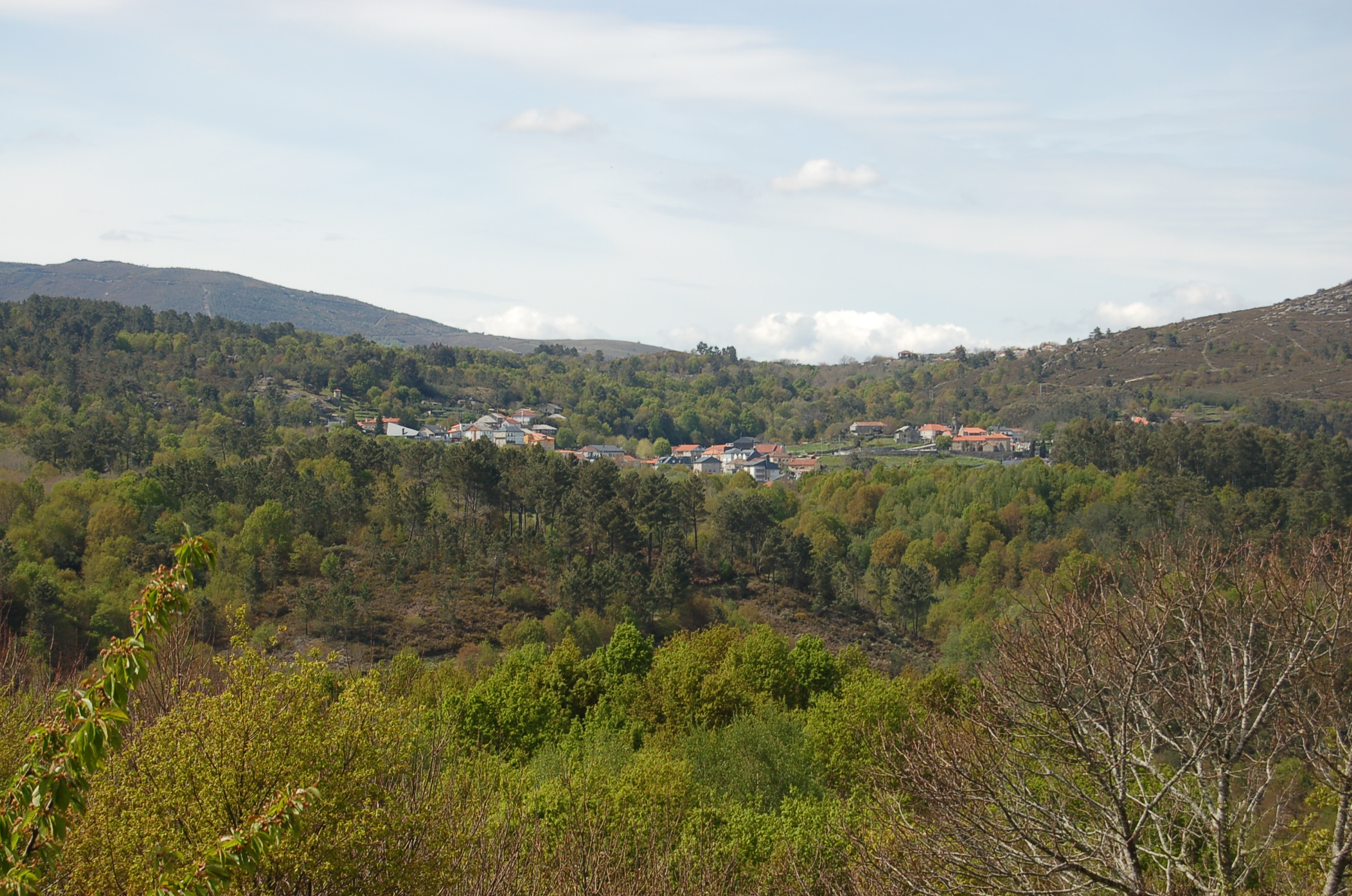 Vista da aldea de Cernadas, na parroquia de Avión, no concello de Avión. Imaxe tomada desde Barroso